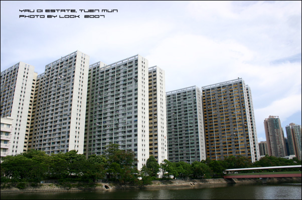 屯門河畔的友愛邨